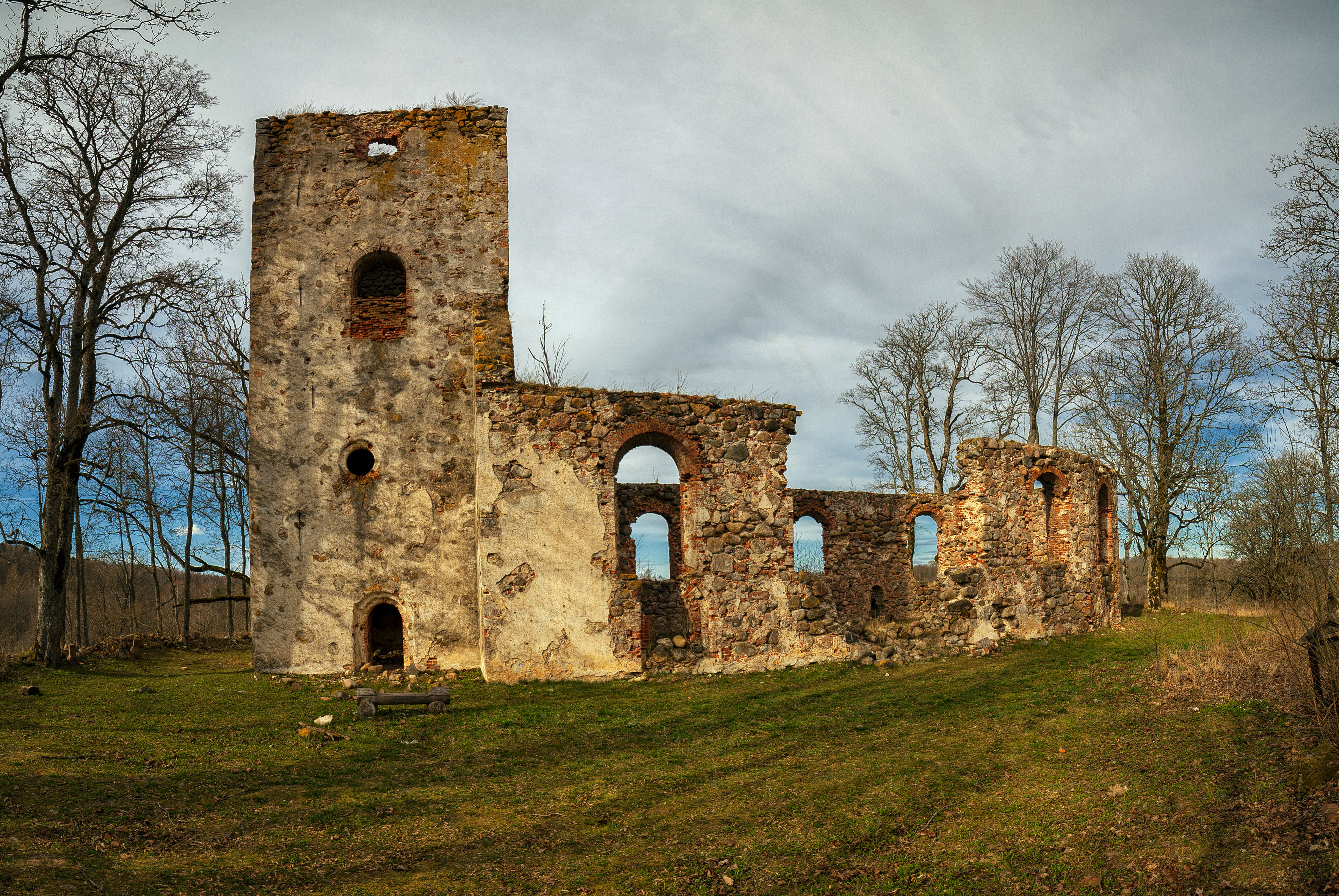 Embūtes baznīcas drupas